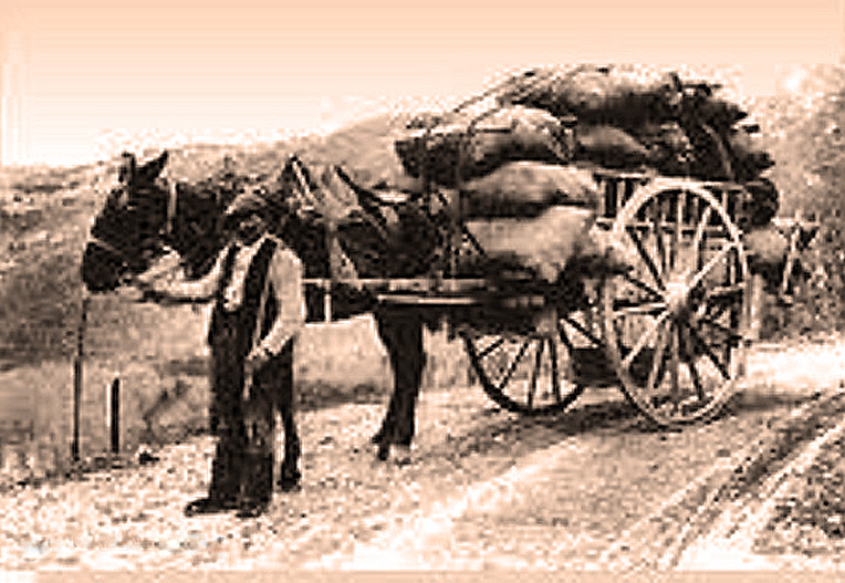 Charbonnier de la montagne de Lure